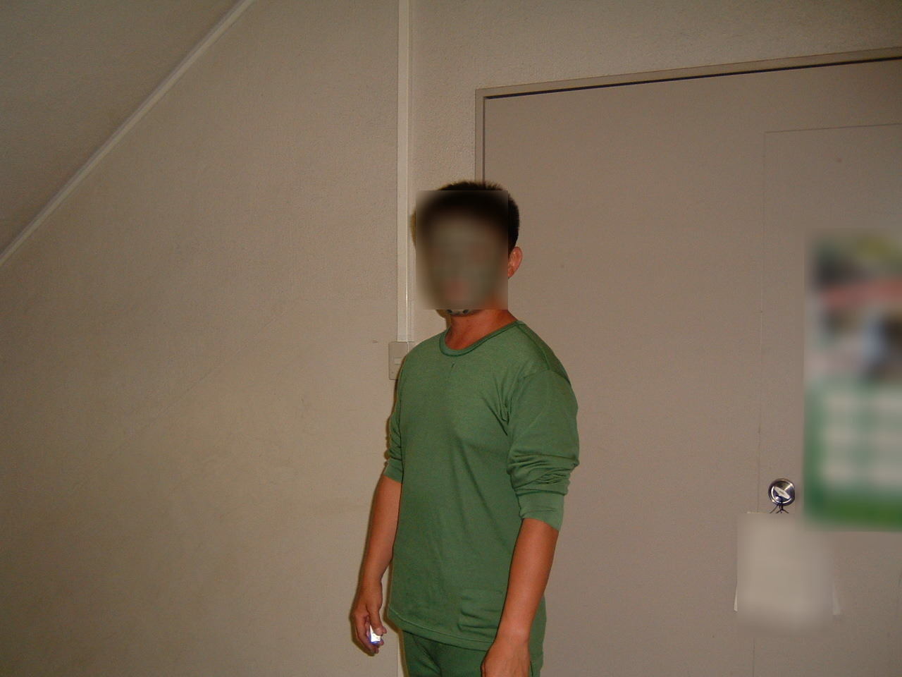 防寒外衣内衣（内）、別名カエルスーツ